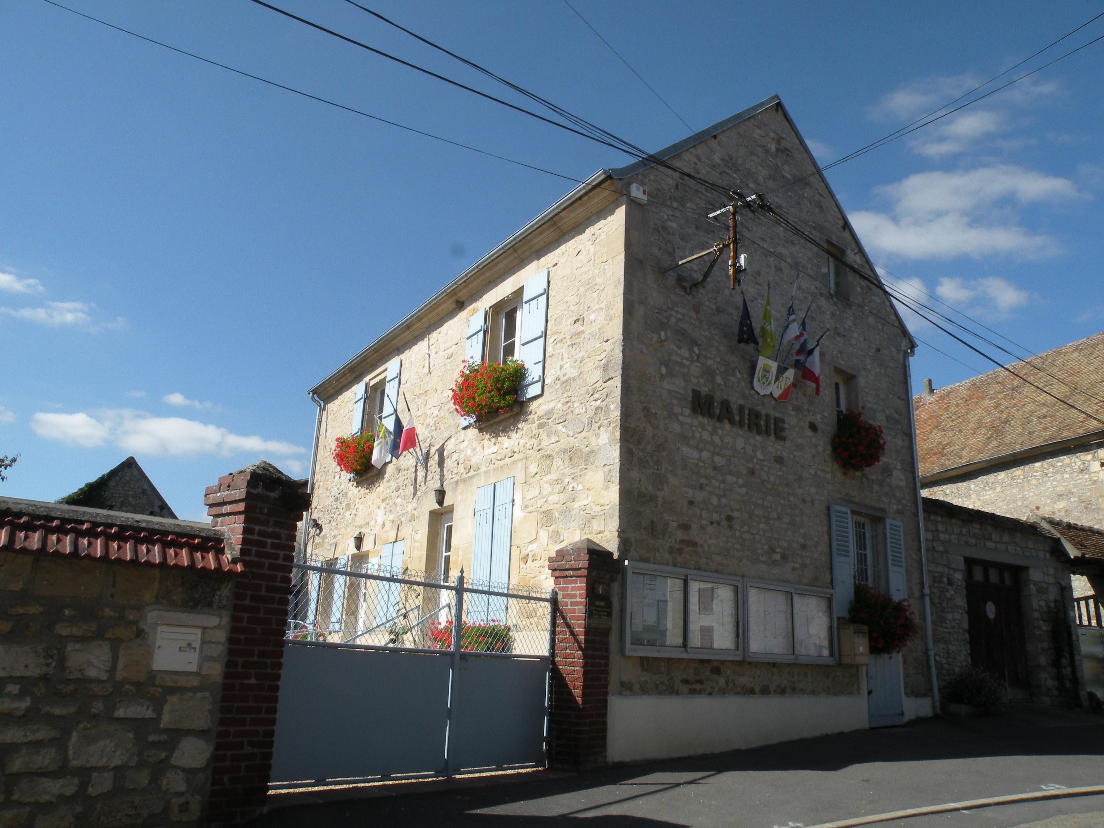 mairie de Bouconvillers